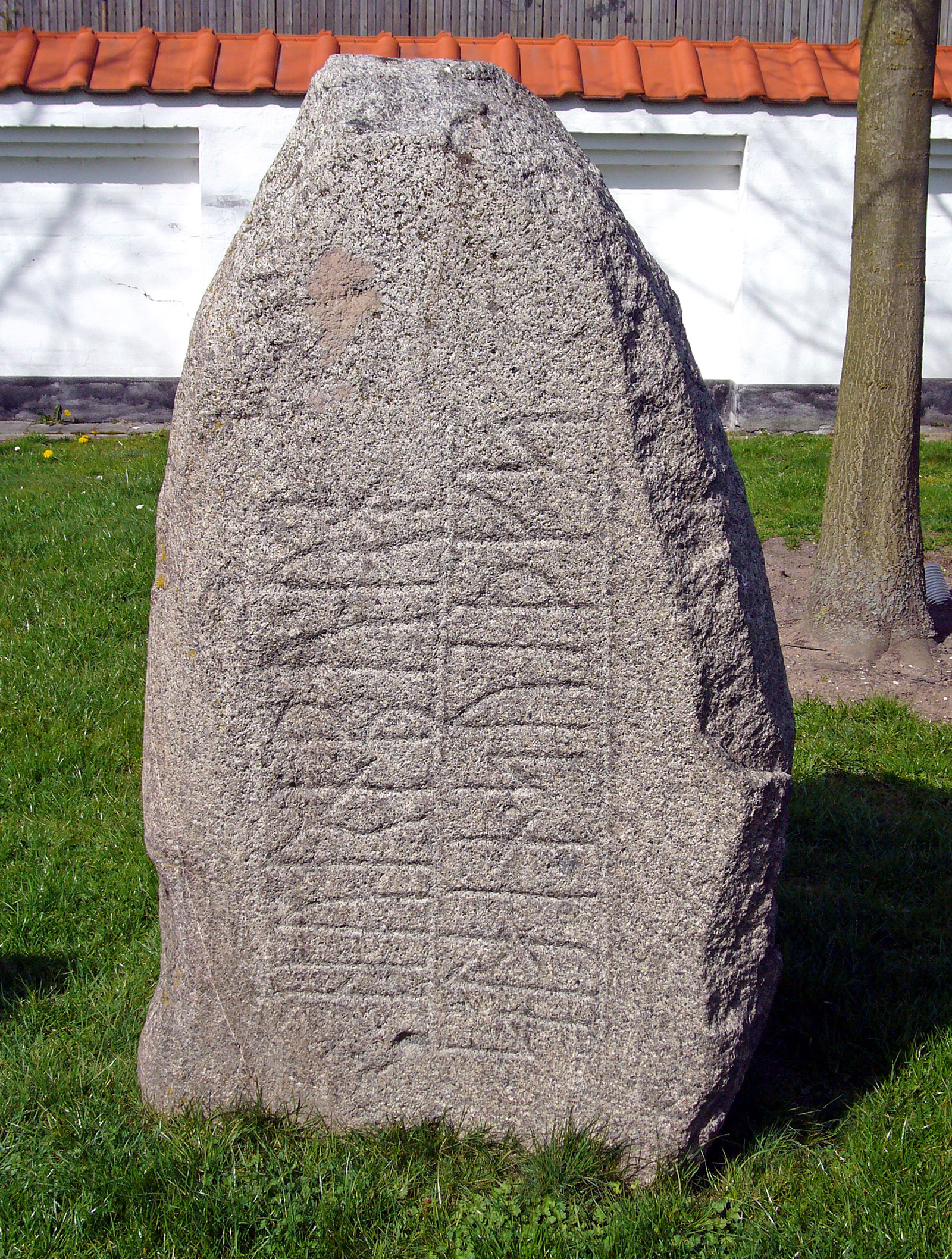 Kallerupstenen, Hedehusene, Denmark